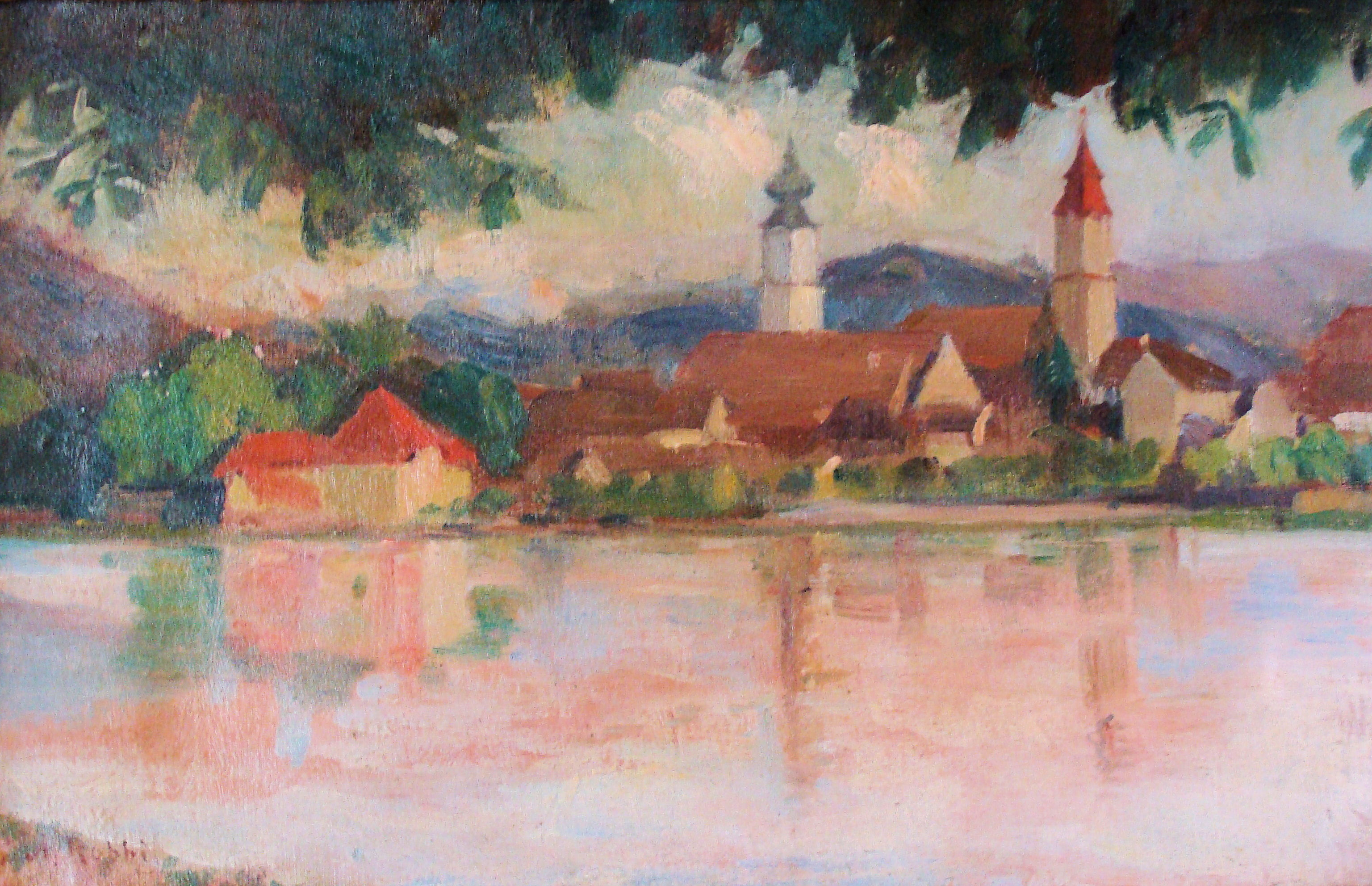 Bodensee-Ansicht von Lindau : Ölgemälde von Adolf Robbi (1900-1910)